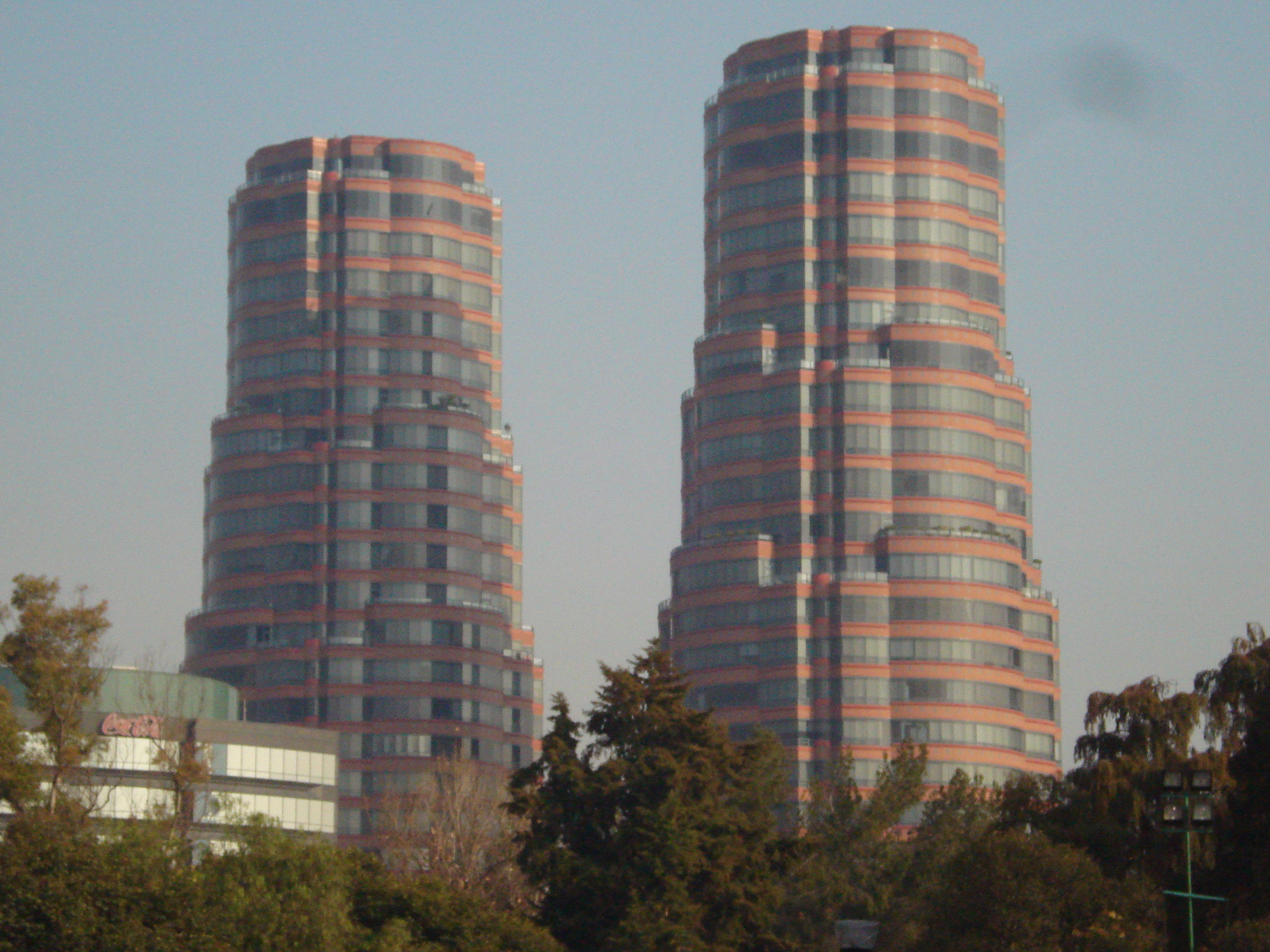 Torres gemelas de Polanco, en la Ciudad de México.